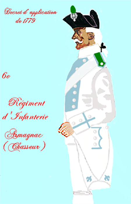 Uniform of a royal french infantry regiment between 1779 and 1786. Taken from: „LES UNIFORMES ET LES DRAPEAUX DE L'ARMÉE DU ROI“ Marseille 1899.